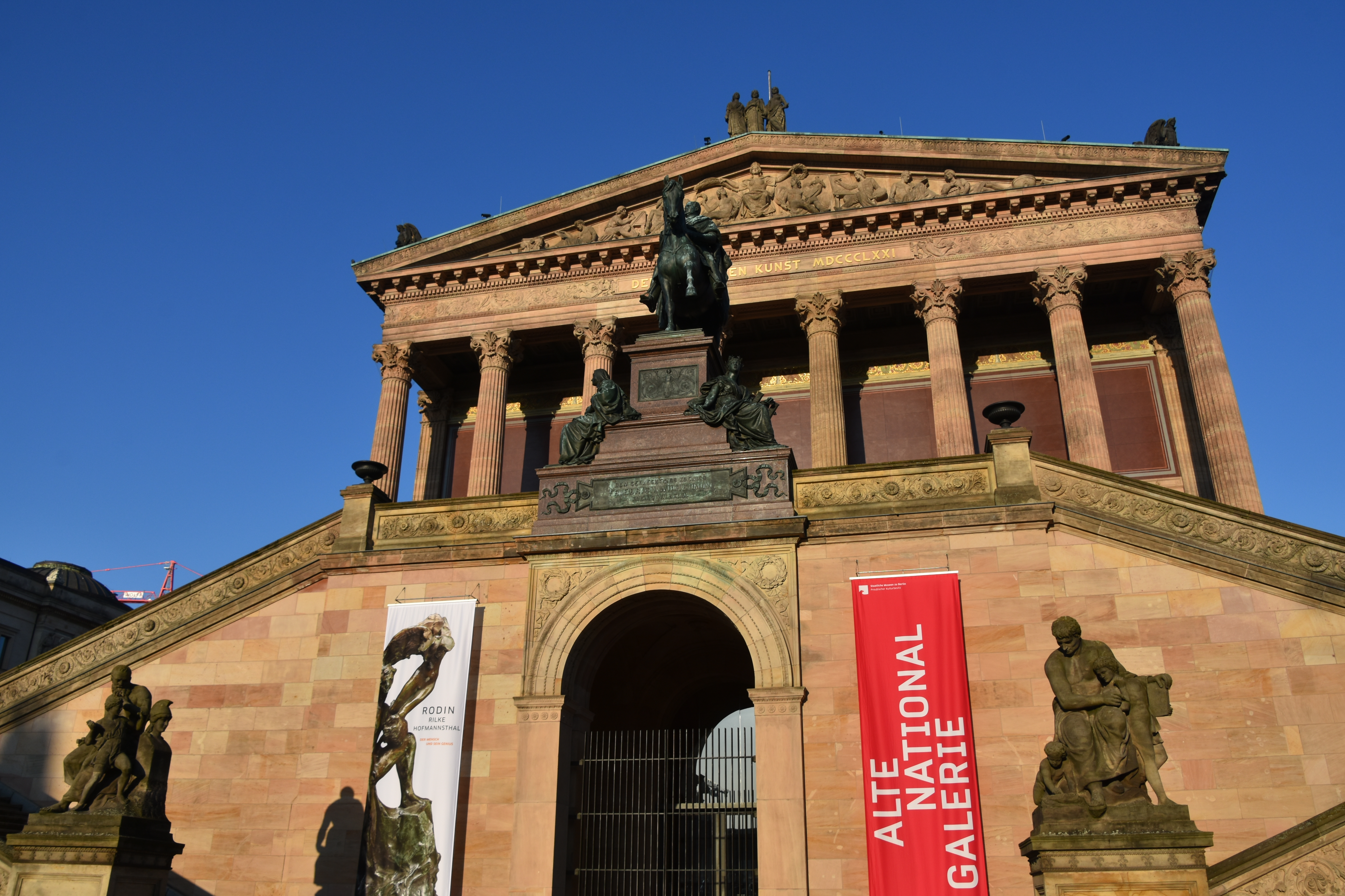 Alte Nationalgalerie, Berlin (7)